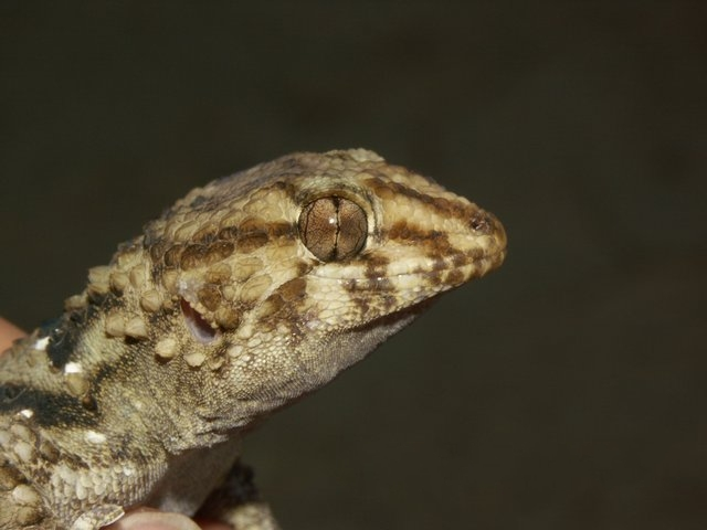 Pachydactylus bibronii